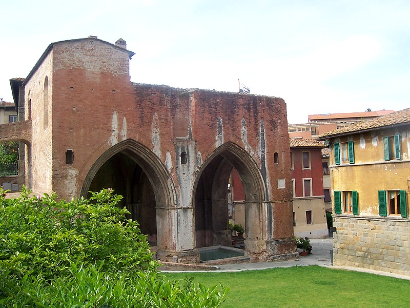 Siena - Fonte Nuova